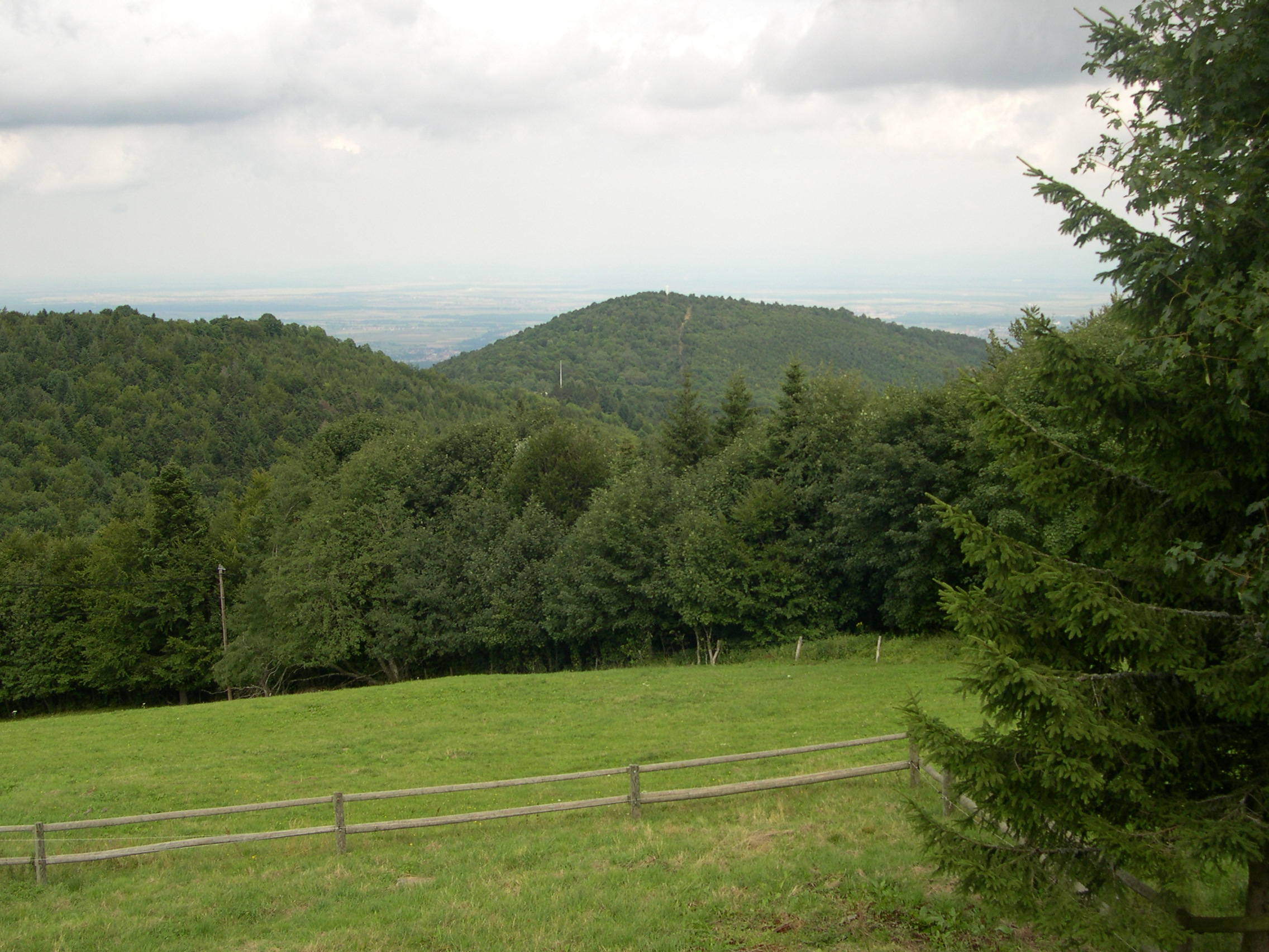 Vue sur le sommet du Vieil Armand, 956 m, dans le massif des Vosges, Haut-Rhin.